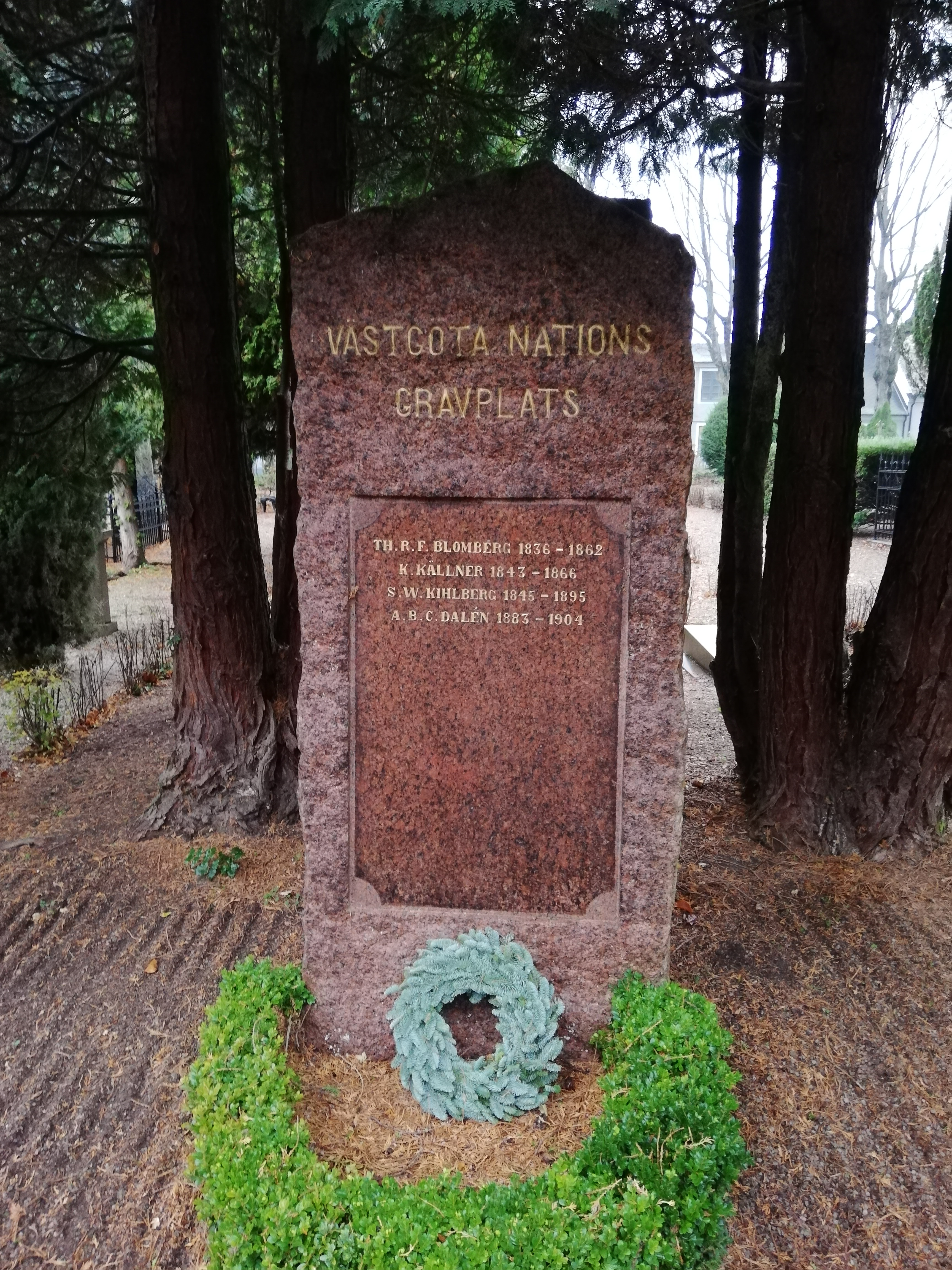 Västgöta nations grav på Östra kyrkogården i Lund.